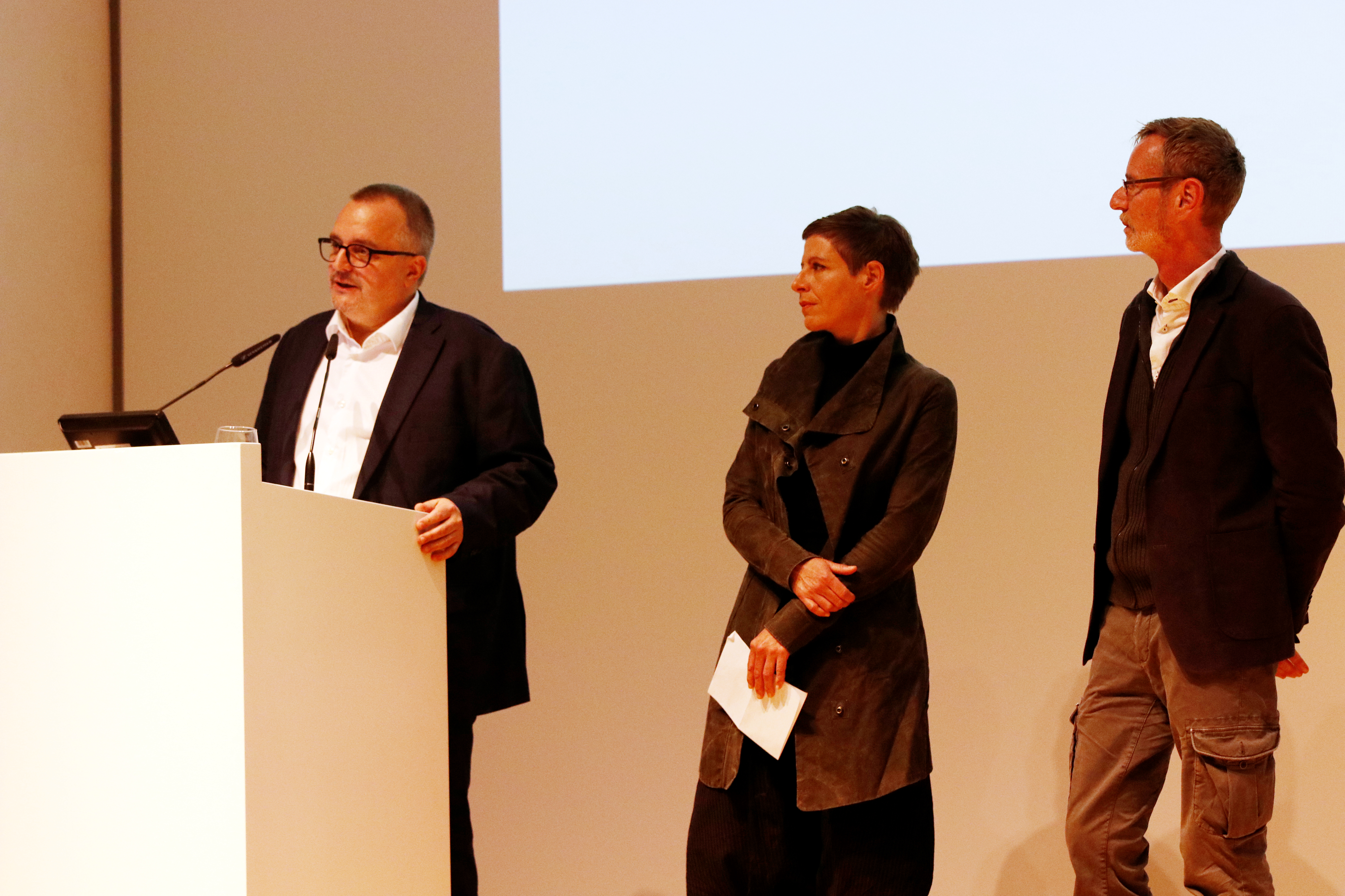 Ausstellungseröffnung im NS-Dokuzentrum, München am 2019-05.29. Die Kuratoren: Andreas Brunner (Wien), Barbara Staudinger (Augsburg), Hannes Sulzenbacher